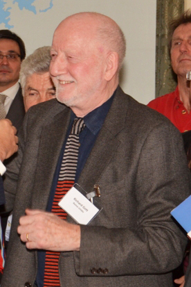 Londres Febrero 6 de 2013. Destacadas personalidades de la política y la cultura de numerosos países de Europa mantuvieron esta mañana en Londres una reunión sin precedentes con el canciller Héctor Timerman y suscribieron una Declaración convocando al diálogo entre la Argentina y el Reino Unido para resolver en forma pacífica y definitiva la disputa de soberanía por las Islas Malvinas